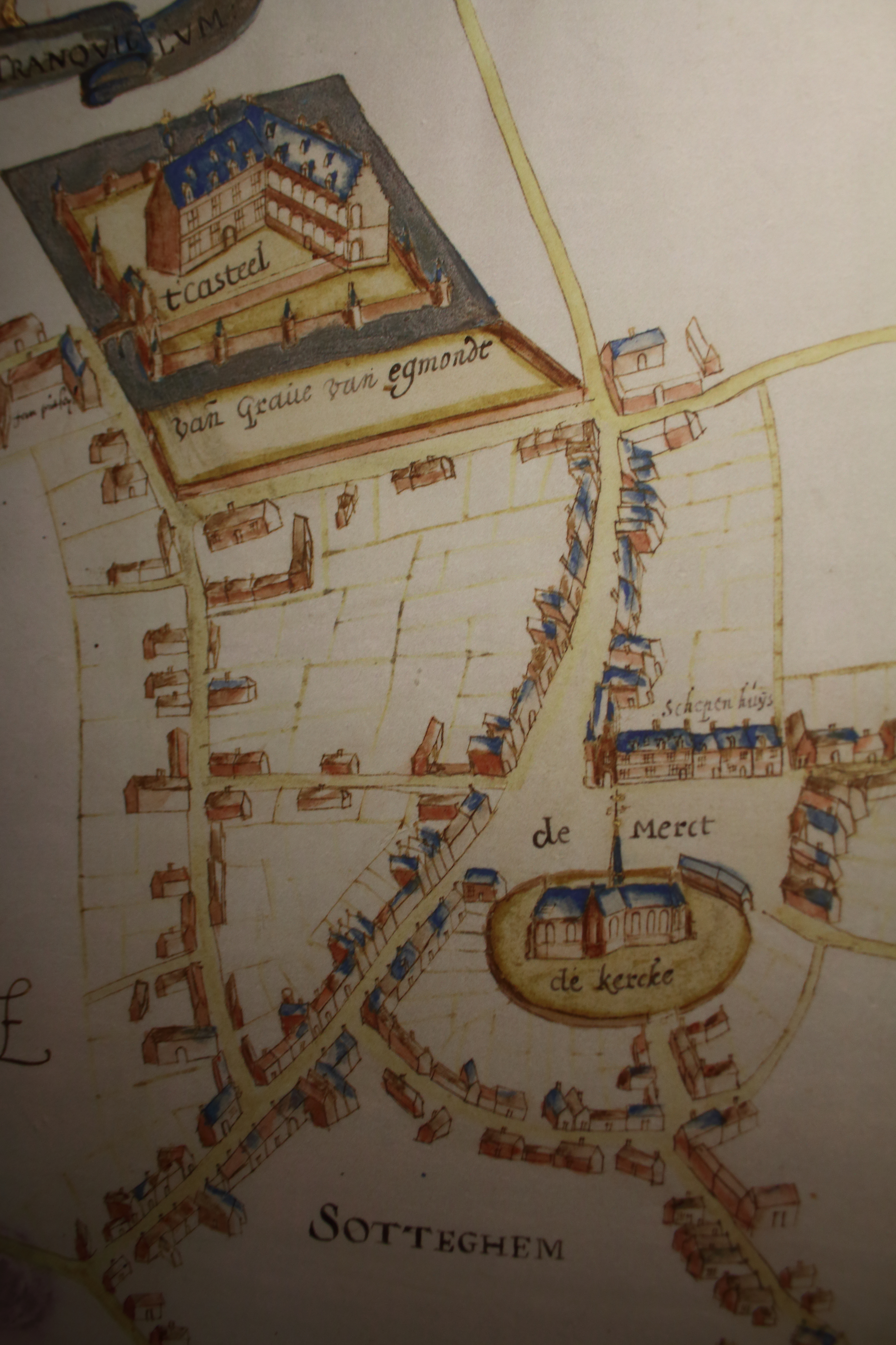 kaart van de vrijgheid van Zottegem, Philips de Dijn, 1629 (Algemeen Rijksarchief Brussel) (reproductie op tentoonstelling 'Graven in vryheydt' Provinciaal Archeocentrum AVE Velzeke)